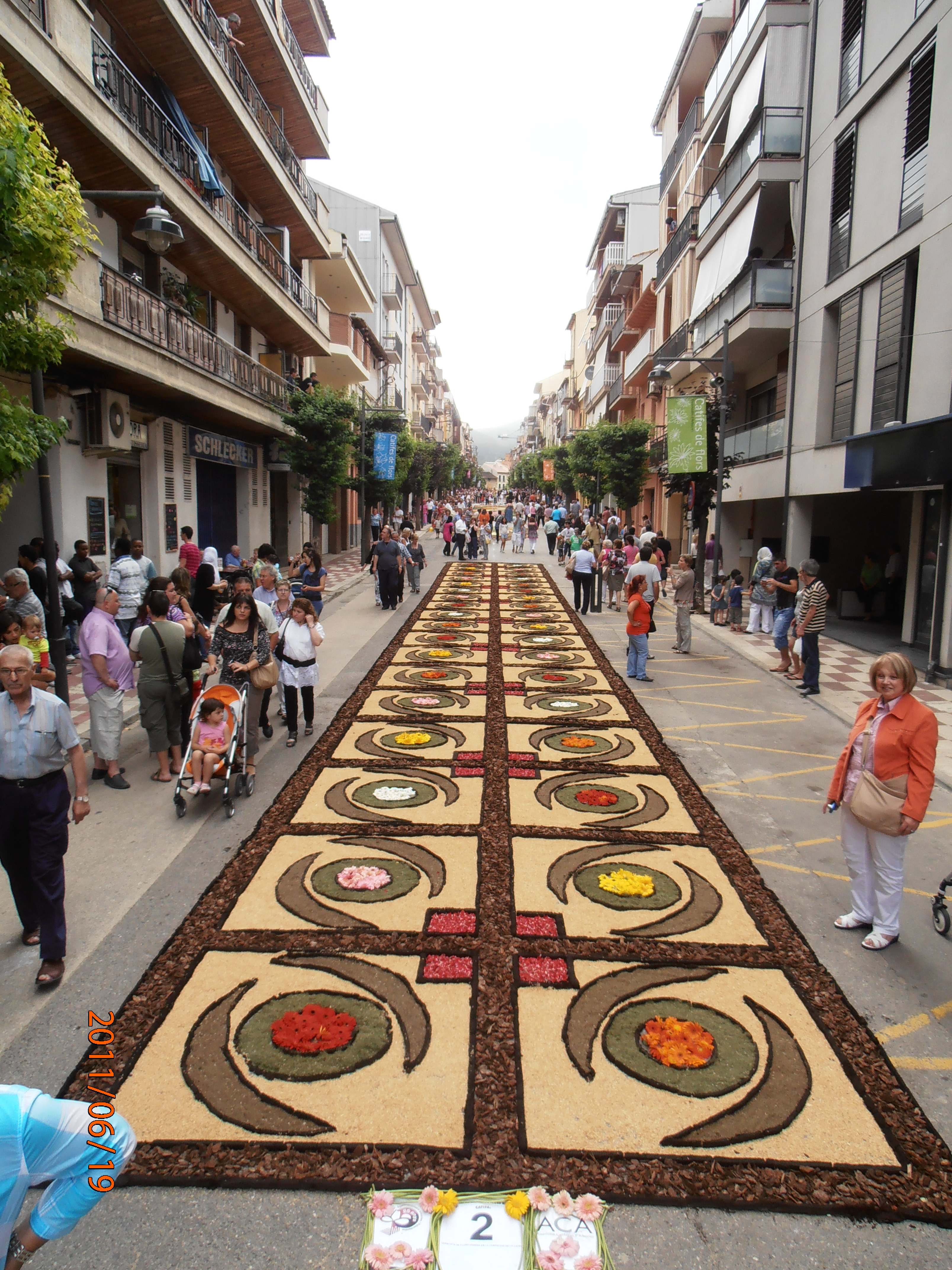 Enramades d'Arbúcies any 2011